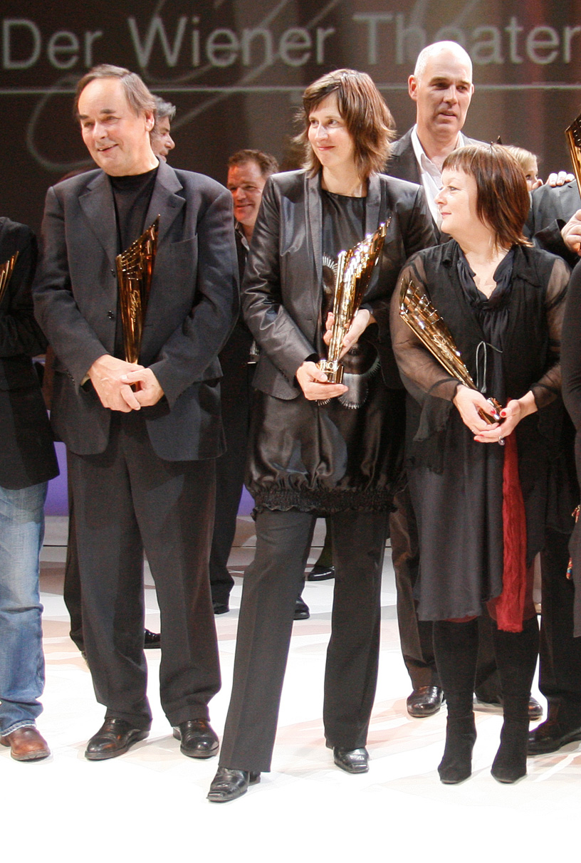 Johann Adam Oest (Beste Nebenrolle), Cornelius Obonya (nominiert für den Spezialpreis), Kathrin Röggla (Autorenpreis), Matthias Hartmann (Spezialpreis) und Sabine Mitterecker (Theater.punkt, beste Off-Produktion) bei der Verleihung des Nestroy-Theaterpreises 2010 im Burgtheater in Wien.